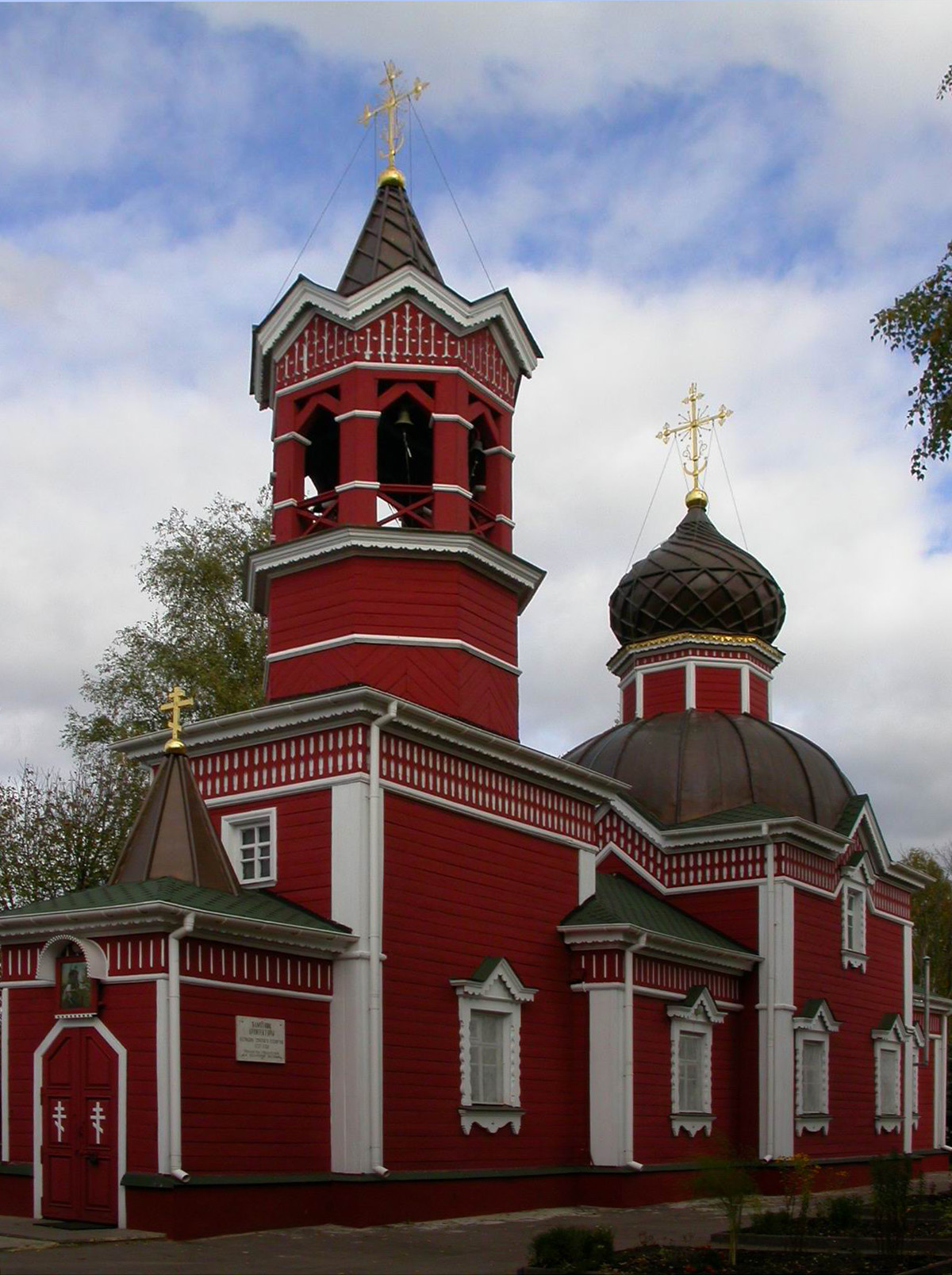 церковь Святого Георгия (1737)